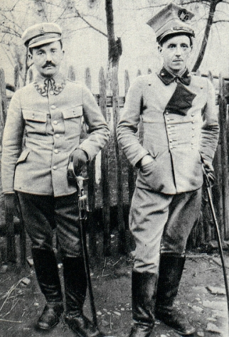 Ppor. Dobaczewski (stary) i dr J. Kamiński.